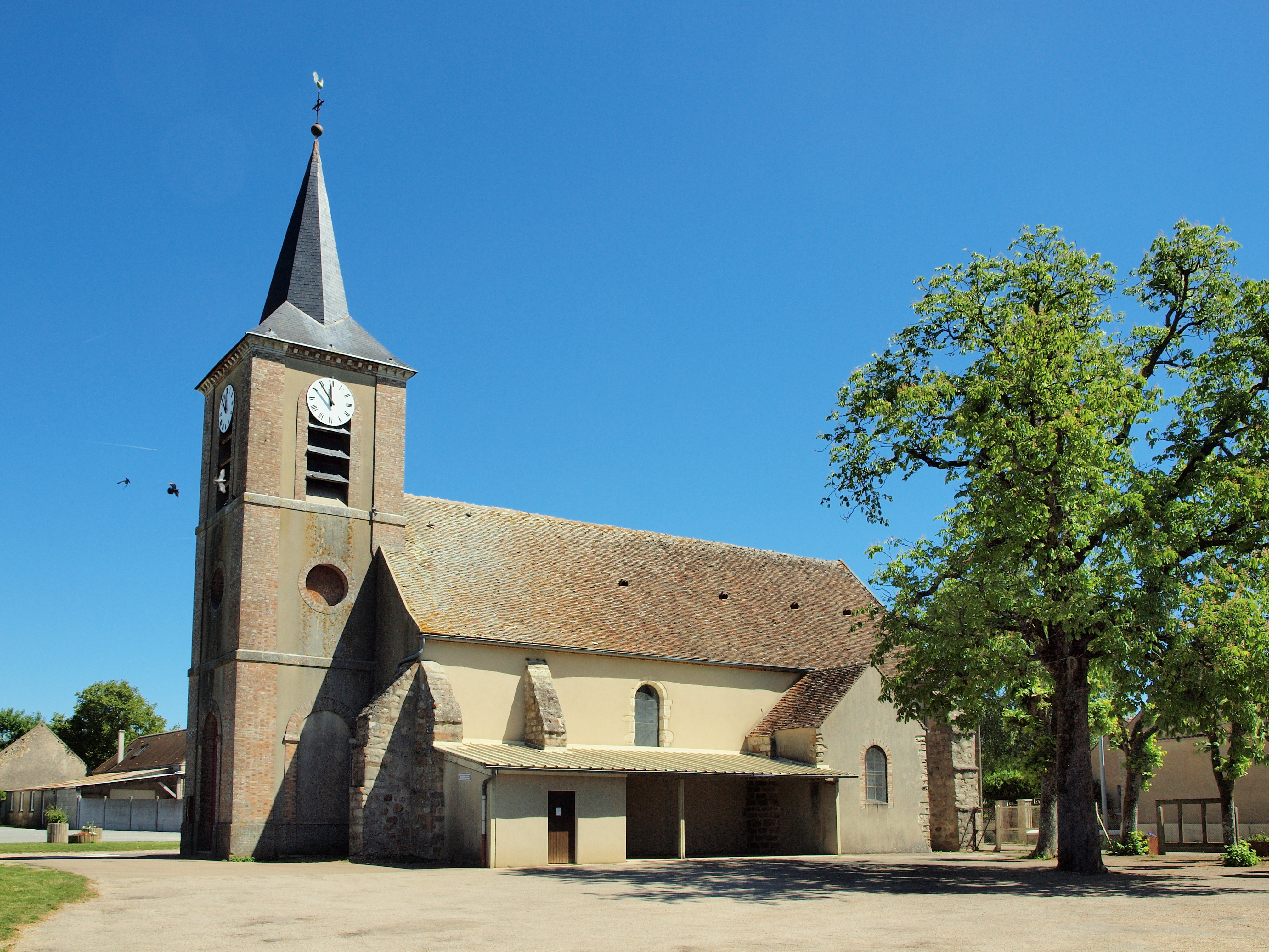 Église Saint-Nicolas de Villebougis (Yonne, France)